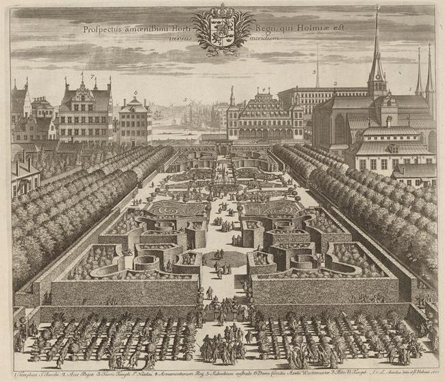 Engraving from Suecia Antiqua et Hodierna, view of Kungsträdgården facing south.